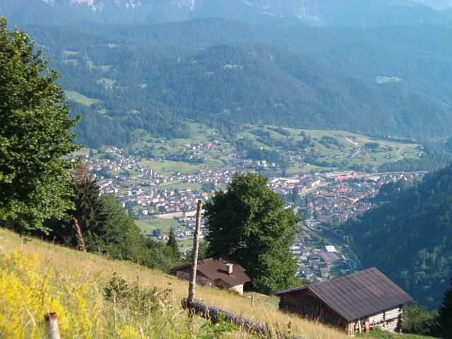 View of Fiera di Primiero and Transacqua, Trentino, Italy